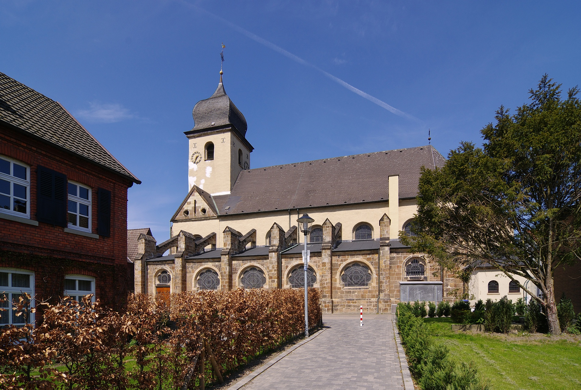 Katholische Kirche St. Stephanus in Bork, Kreis Unna, Nordrhein-Westfalen.